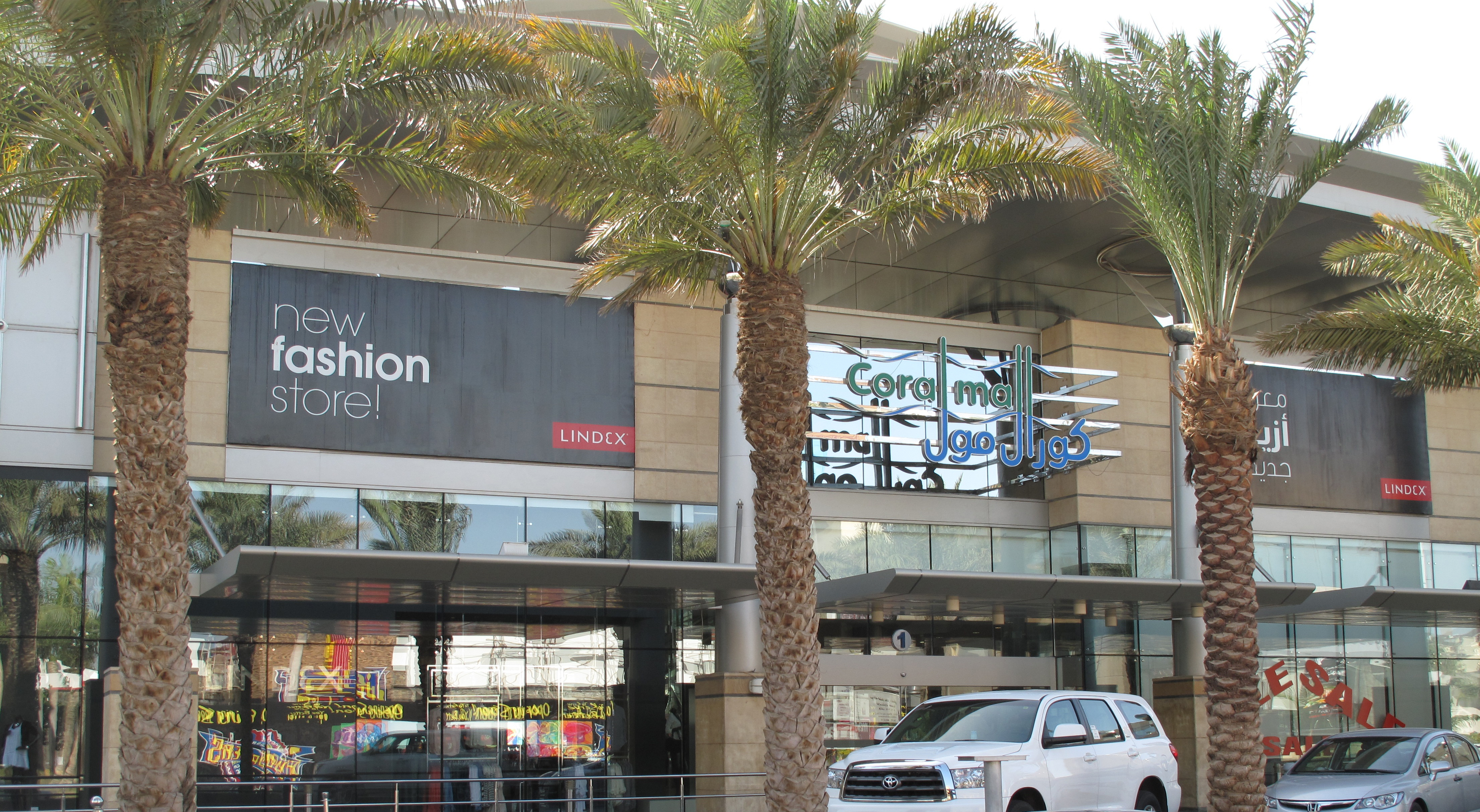 Lindex i Coral Mall, Saudiarabien